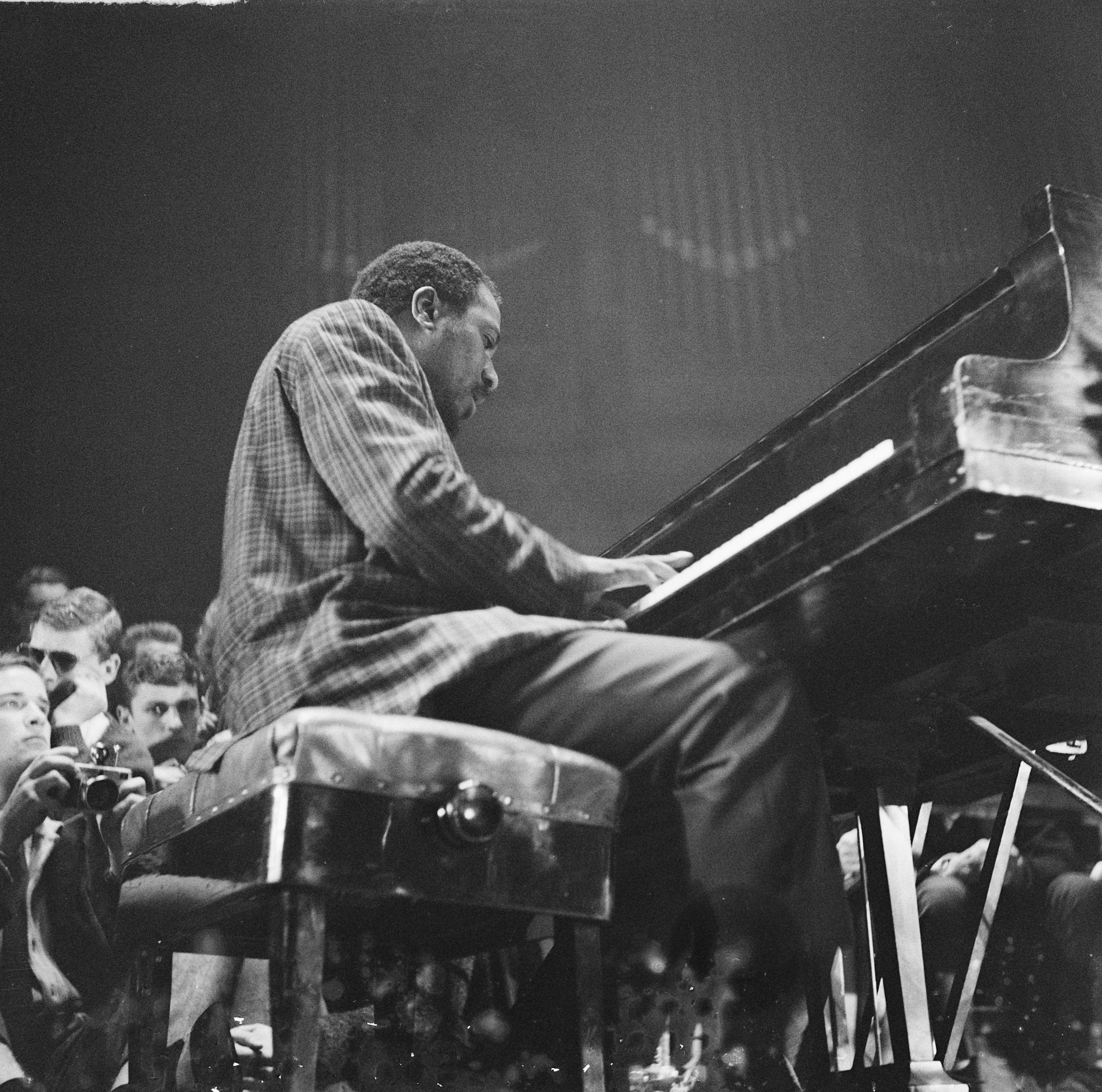 Collectie / Archief : Fotocollectie Anefo Reportage / Serie : [ onbekend ] Beschrijving : Nachtconcert van Thelonious Monk in het Concertgebouw Datum : 15 april 1961 Trefwoorden : CONCERTGEBOUWEN, Nachtconcerten Persoonsnaam : Monk, Thelonious Fotograaf : Fotograaf Onbekend / Anefo Auteursrechthebbende : Nationaal Archief Materiaalsoort : Negatief (zwart/wit) Nummer archiefinventaris : bekijk toegang 2.24.01.03 Bestanddeelnummer : 912-3528